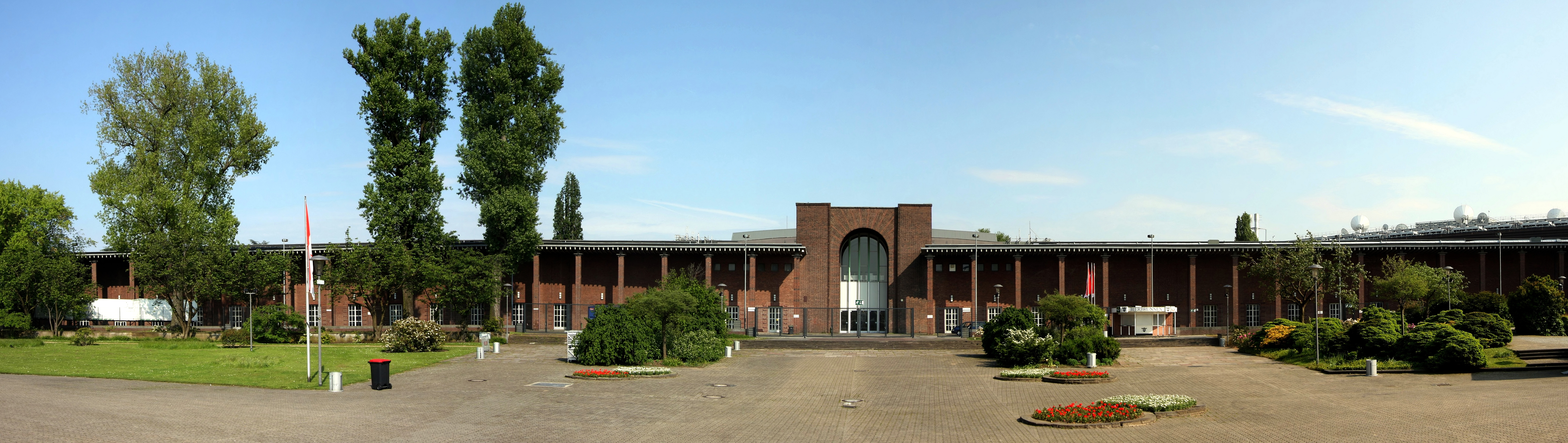 Staatenhaus im Rheinpark Köln. Architekt: Adolf Abel